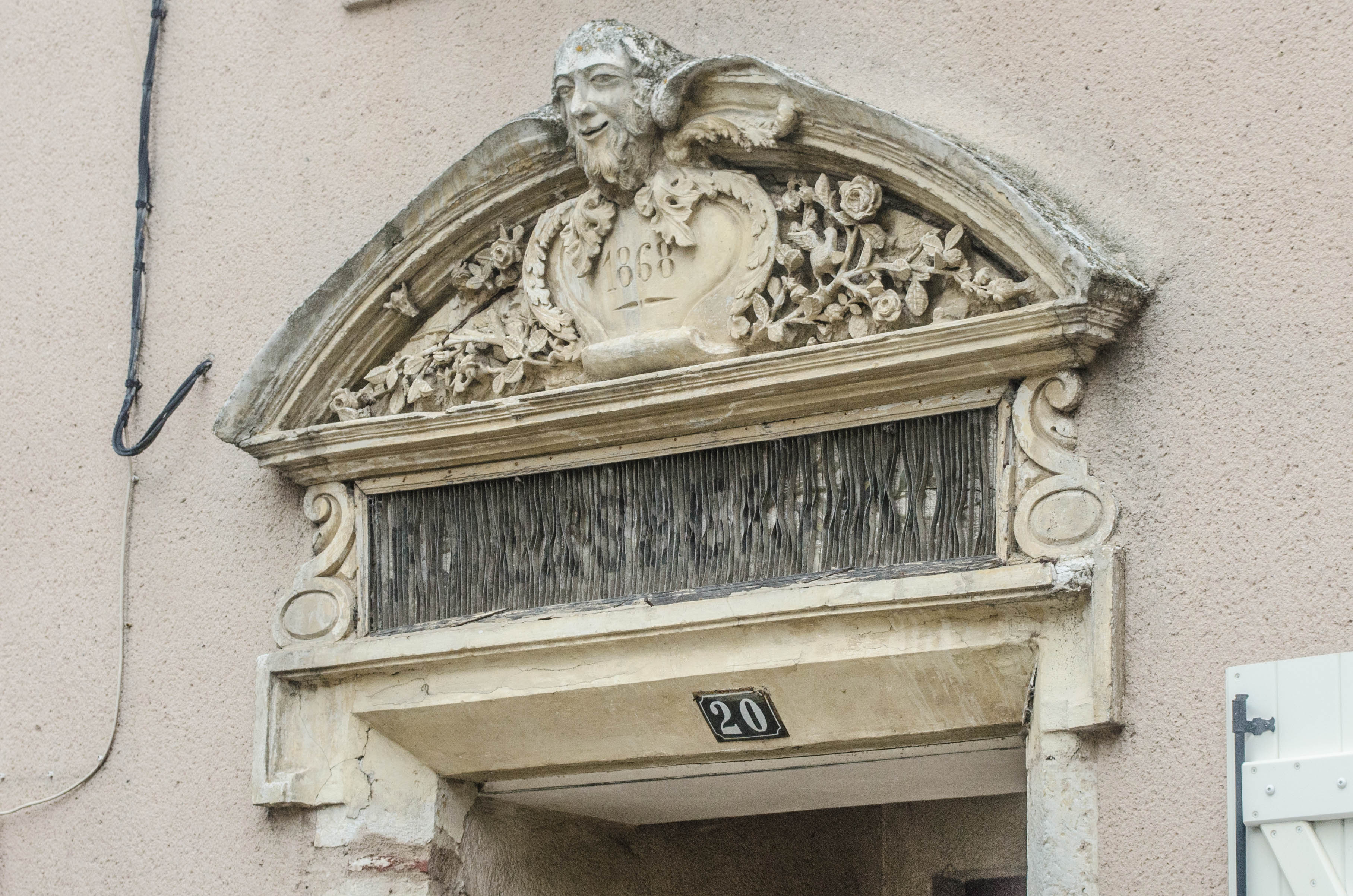 Porte de la maison de la famille Lasseran à Lectoure, Gers, France : Prosper Lasseran, sculpteur, son fils Paul Noël Lasseran, peintre.